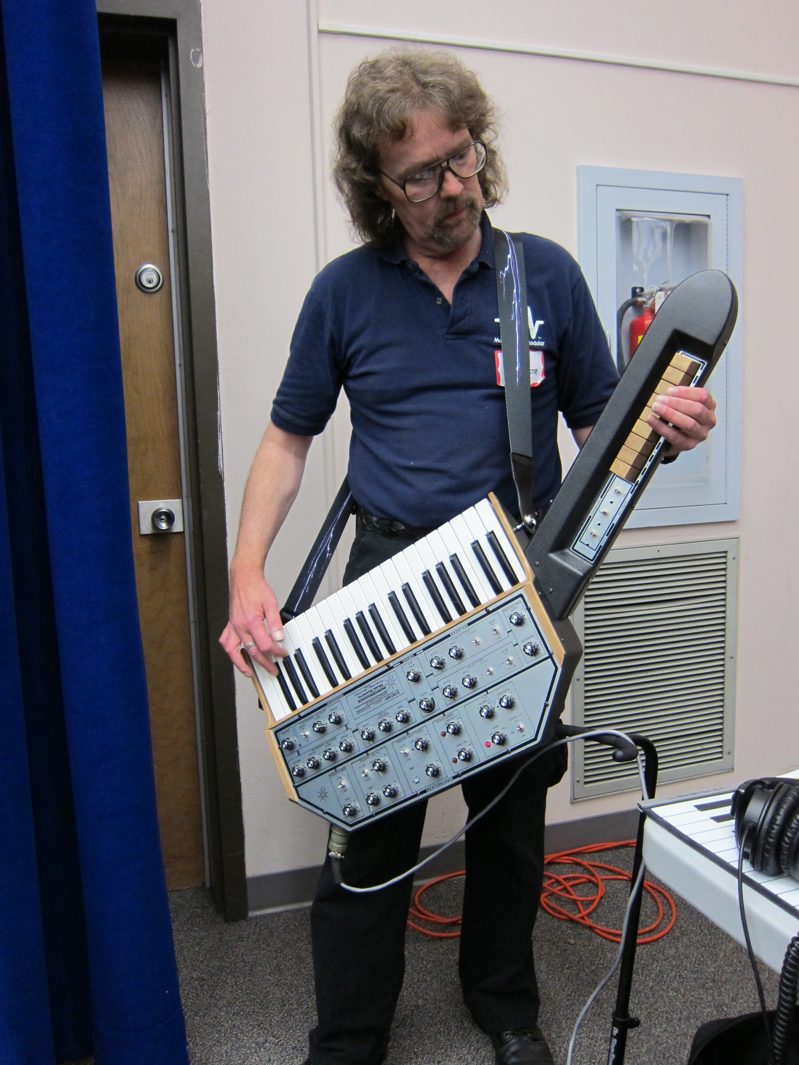 PMS Syntar inventor George Mattson